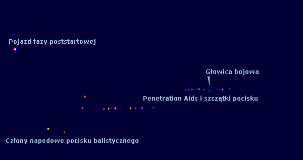 Obraz penetration aids w podczerwieni widziany przez teleskop głowicy antybalistycznej EKV. (Penetretion Aids - view from antibalistic EKV's infra-red telescope)